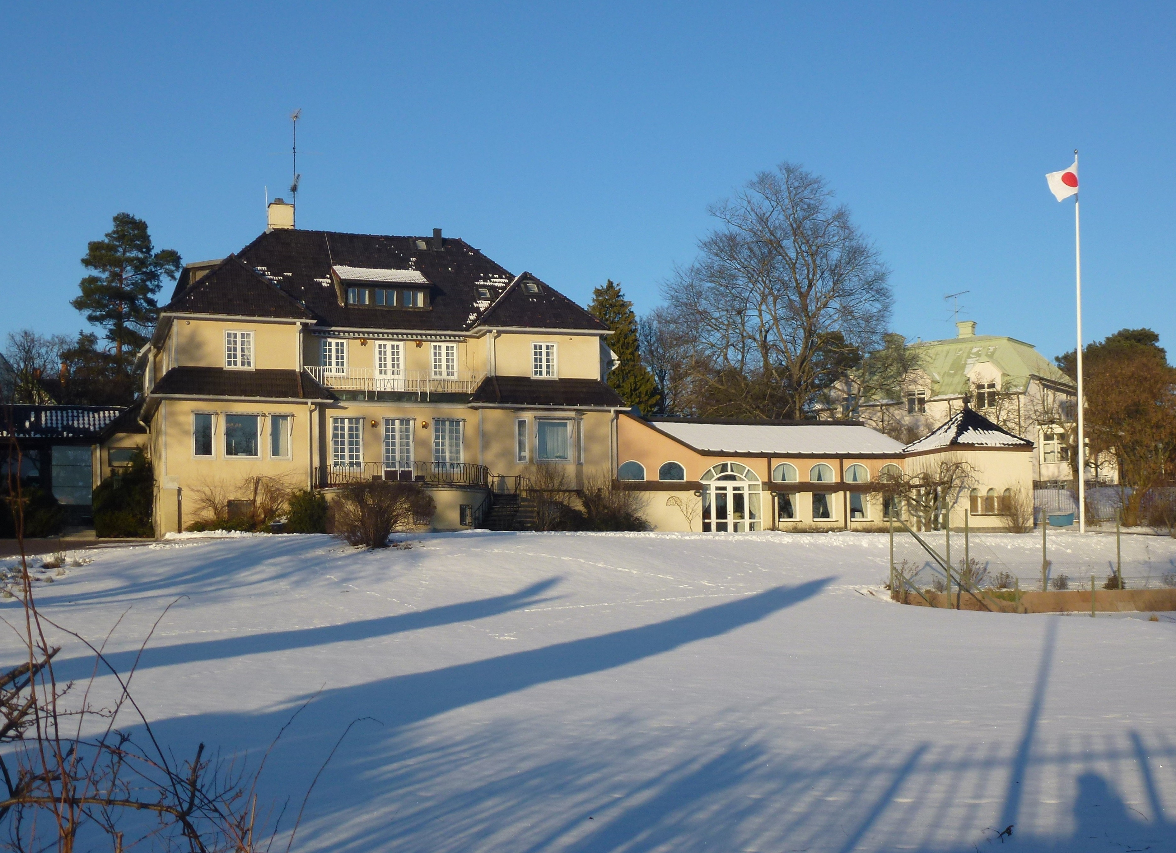 Fastigheten Elivågor 2, Japanska ambassadörens residens, Strandvägen 33, Djursholm, arkitekt Karl Güettler